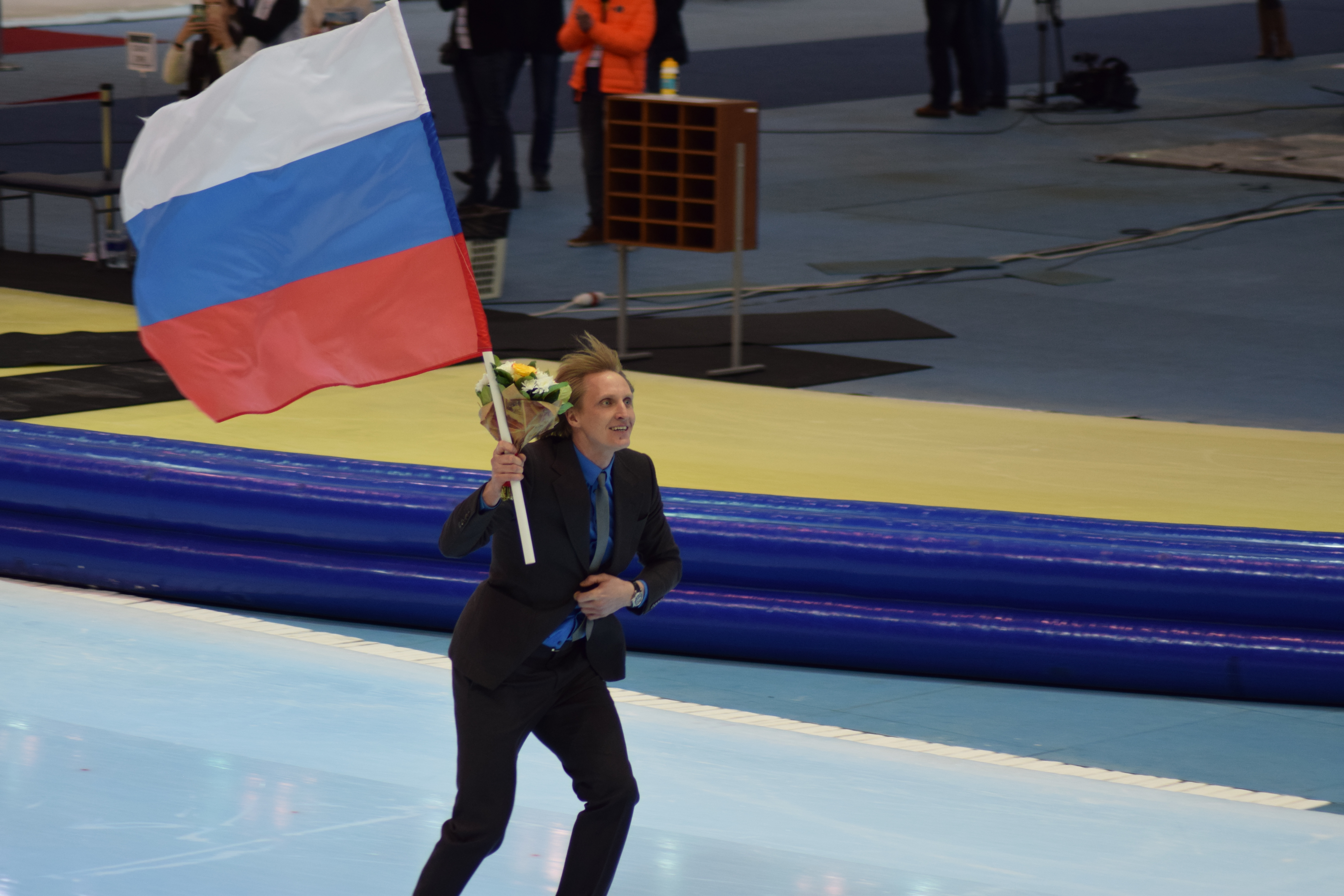 Ivan Skobrev Kolomna 2016